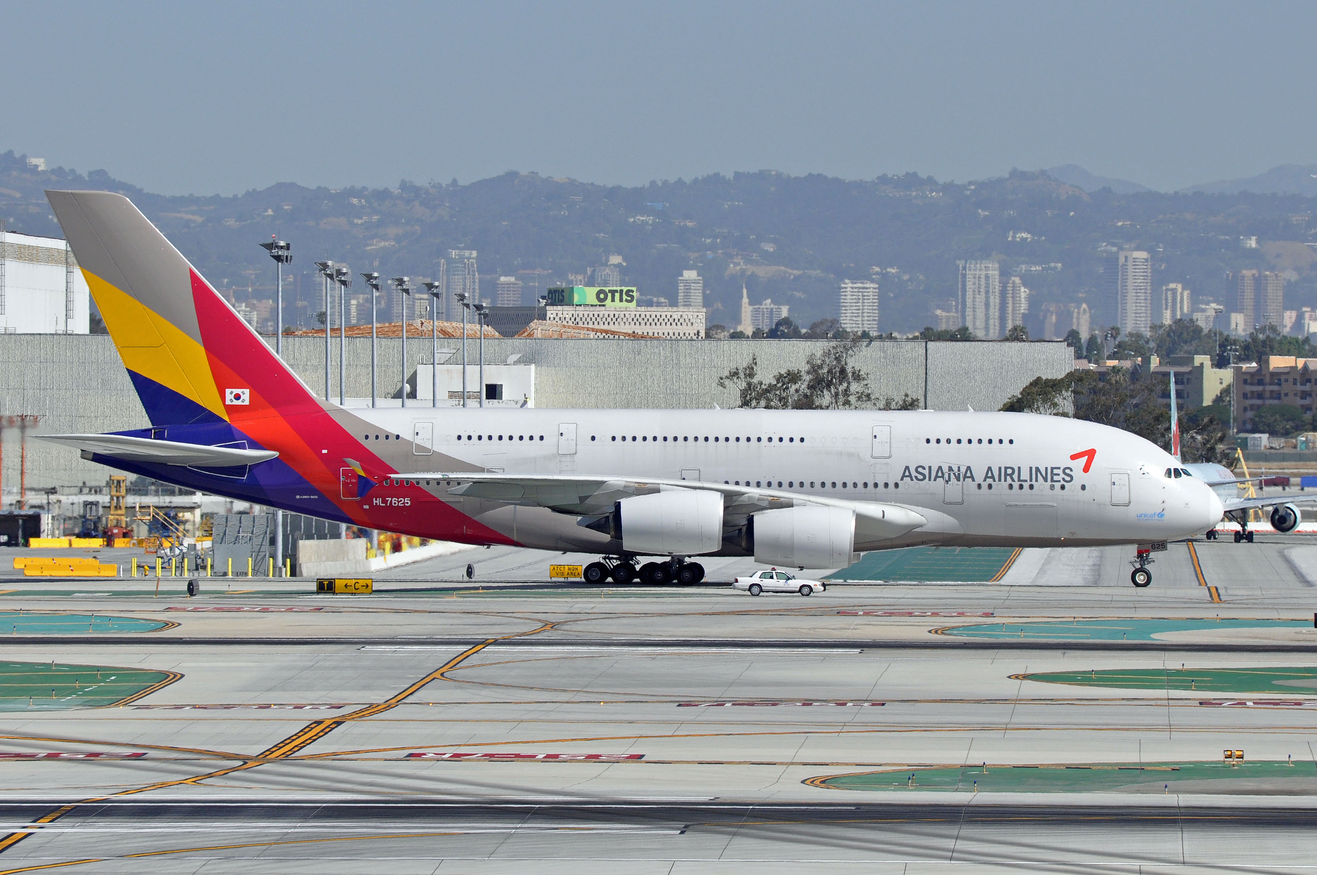 MSN 152 A380-841 / A380 / A380-800 ASIANA AIRLINES LAX AIRPORT